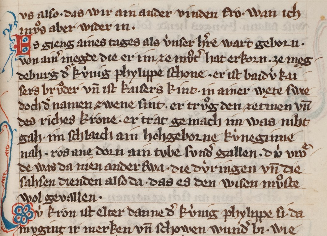 Der II. Spruch aus dem 1. Philippston Walthers von der Vogelweide: „Magdeburger Weihnacht“ (L 19,5) in der Weingartner Liederhandschrift - WLB Stuttgart HB XIII 1, S. 169